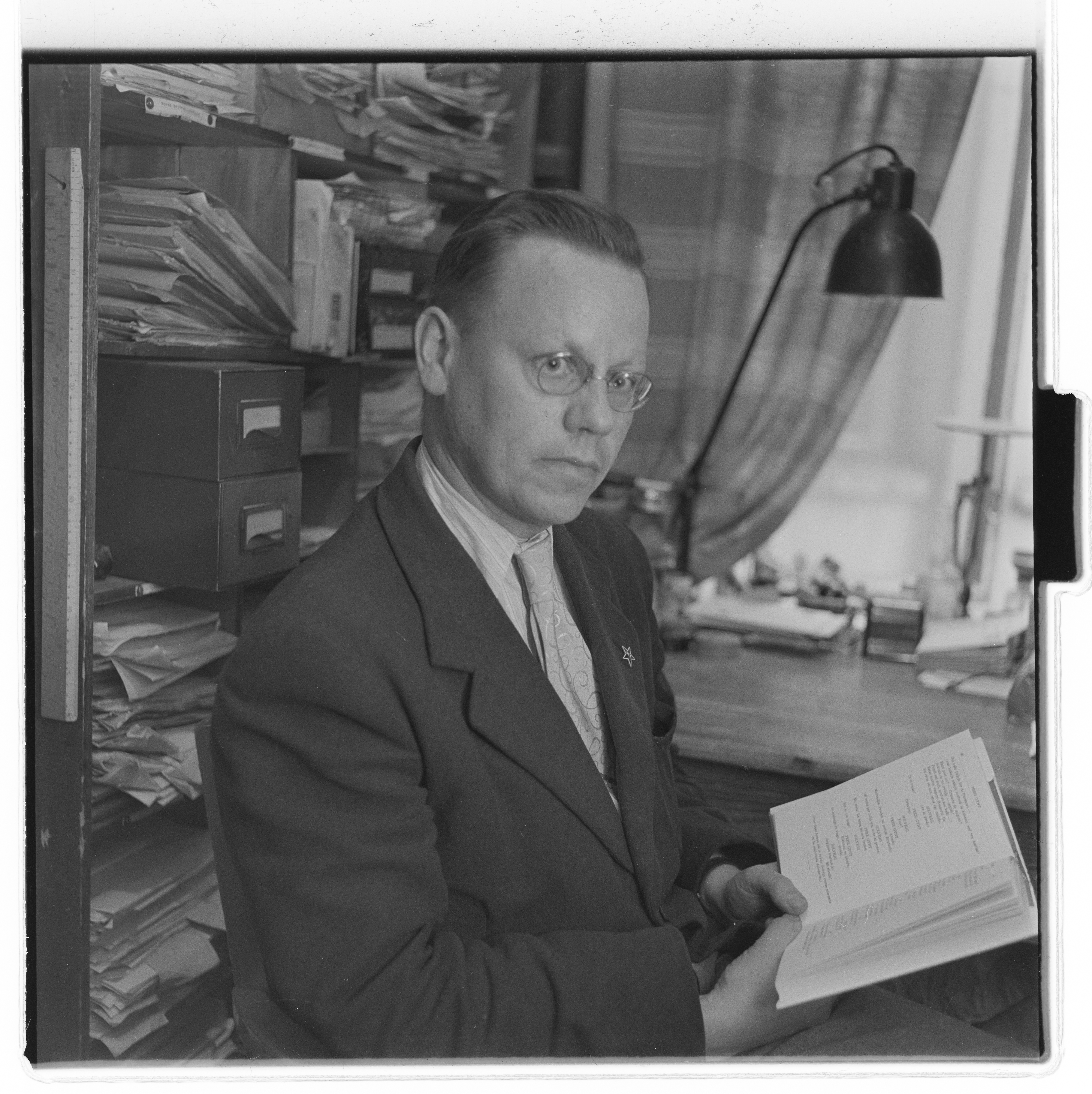 Bildet er hentet fra Arkivverket. Carl Støp-Bowitz, norsk zoolog og president i Norvega Esperantista Ligo. Arkivinstitusjon : Riksarkivet Arkivnavn : Billedbladet NÅ Sted : Norge, Ukjent, Ukjent, Emneord: Esperanto, Norske zoologer Avbildet